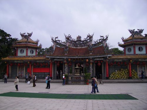 臺北市士林區芝山岩惠濟宮。